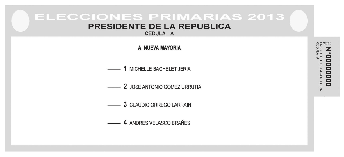 Cédula A de votación para las elecciones primarias presidenciales de 2013, entregada sólo a los militantes de partidos integrantes del pacto Nueva Mayoría (PDC-PS-PPD-PRSD-PC-IC-MAS).